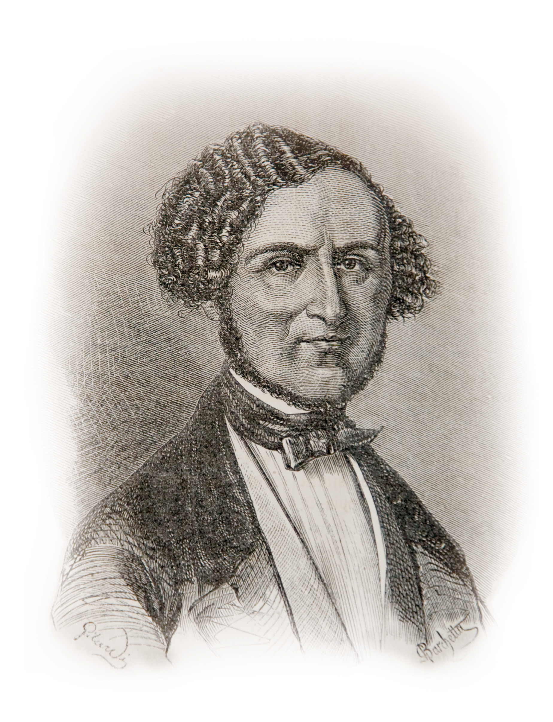 Ritratto di Macedonio Melloni